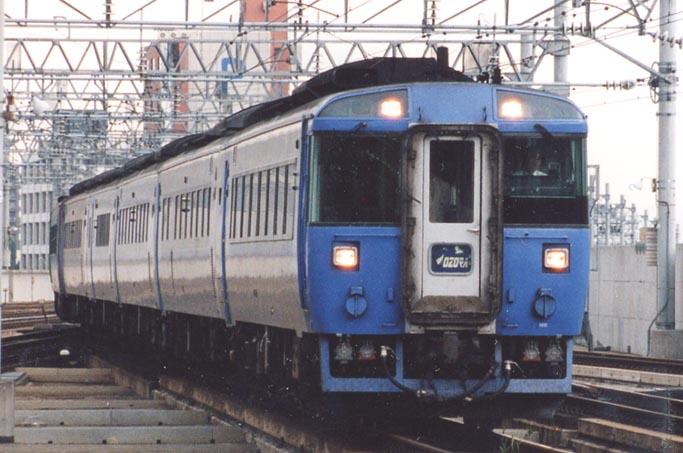 札幌駅に進入する、キハ183系特急おおぞら